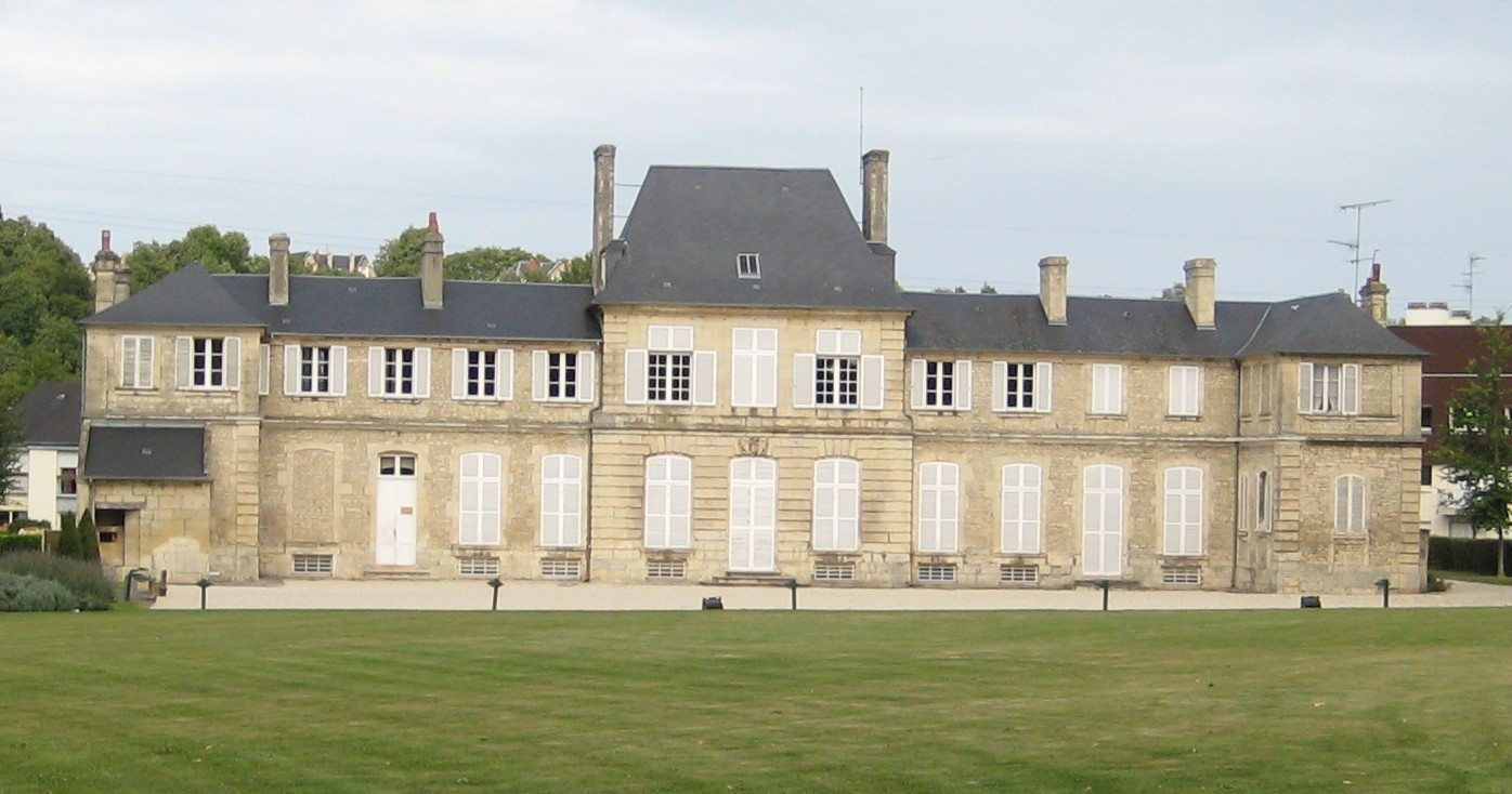 Château de Bellemaist à Mondeville. Ancien relais de chase construit au XVIIe, actuellement occupé par l'école de musique et de danse